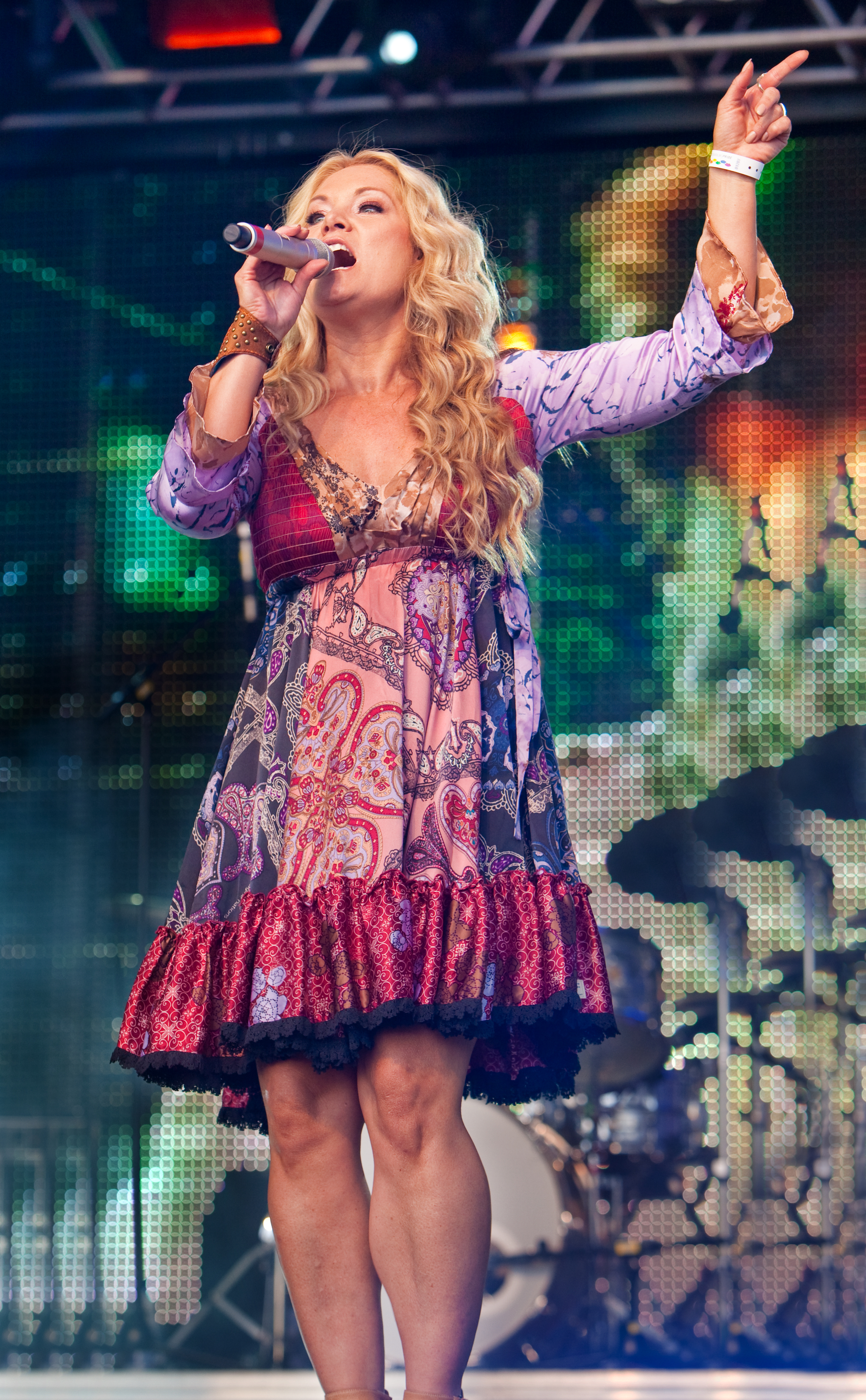 Ankie Bagger at Stockholm Pride 2010